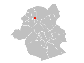 Locatie van de halte (zie bestandsnaam).